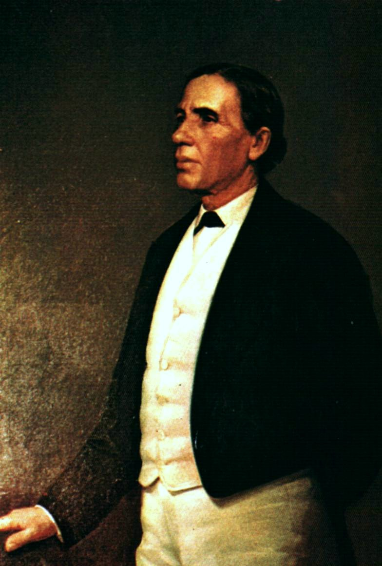 Martín Tovar y Tovar (1827 - 1902): Retrato de Wencelao Urrutia. Oleo/tela. Circulo Militar. Caracas - Venezuela